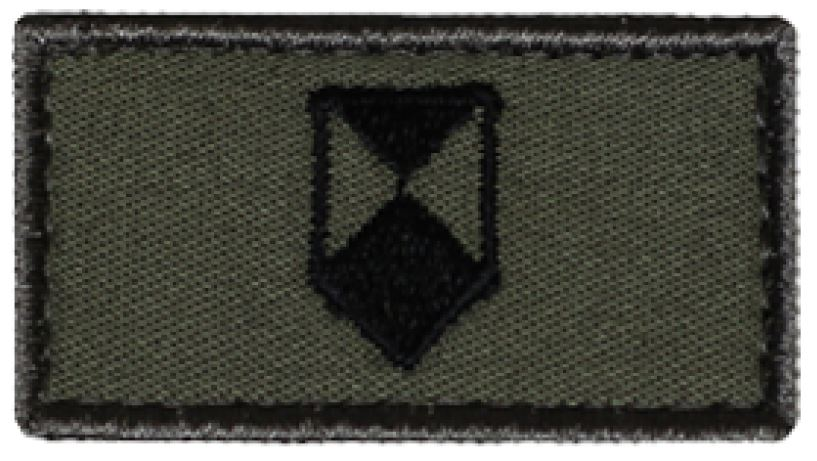 Kulturgüterschutz